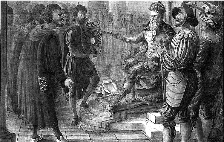 Karel V erkent Nijmegen als Rijksstad en verleent het stadswapen de keizerskroon